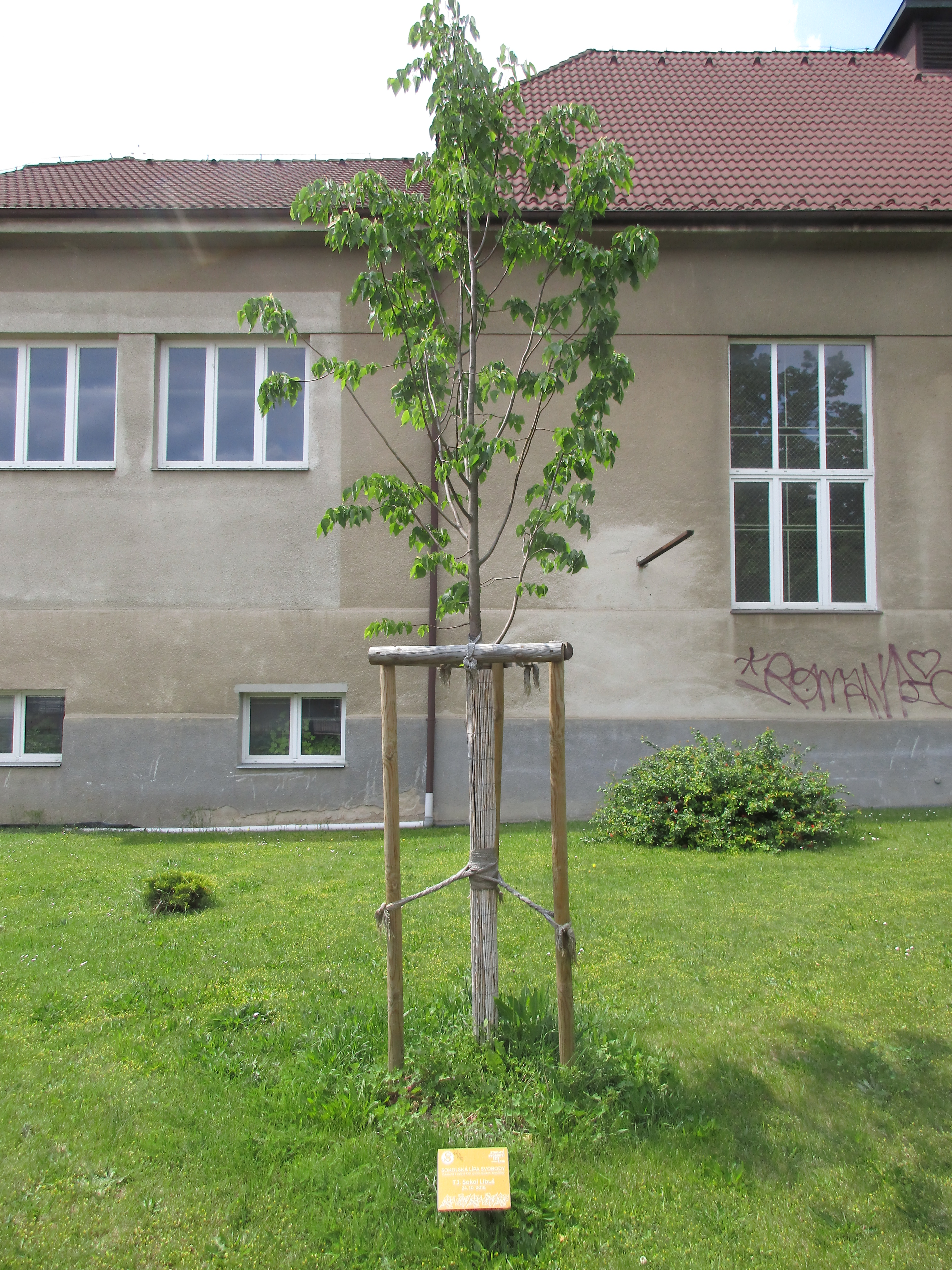 Lípa republiky. Praha 4 - Libuš, u libušské sokolovny. Vysazena 24. října 2018 na památku 100. výročí vzniku Československé republiky.